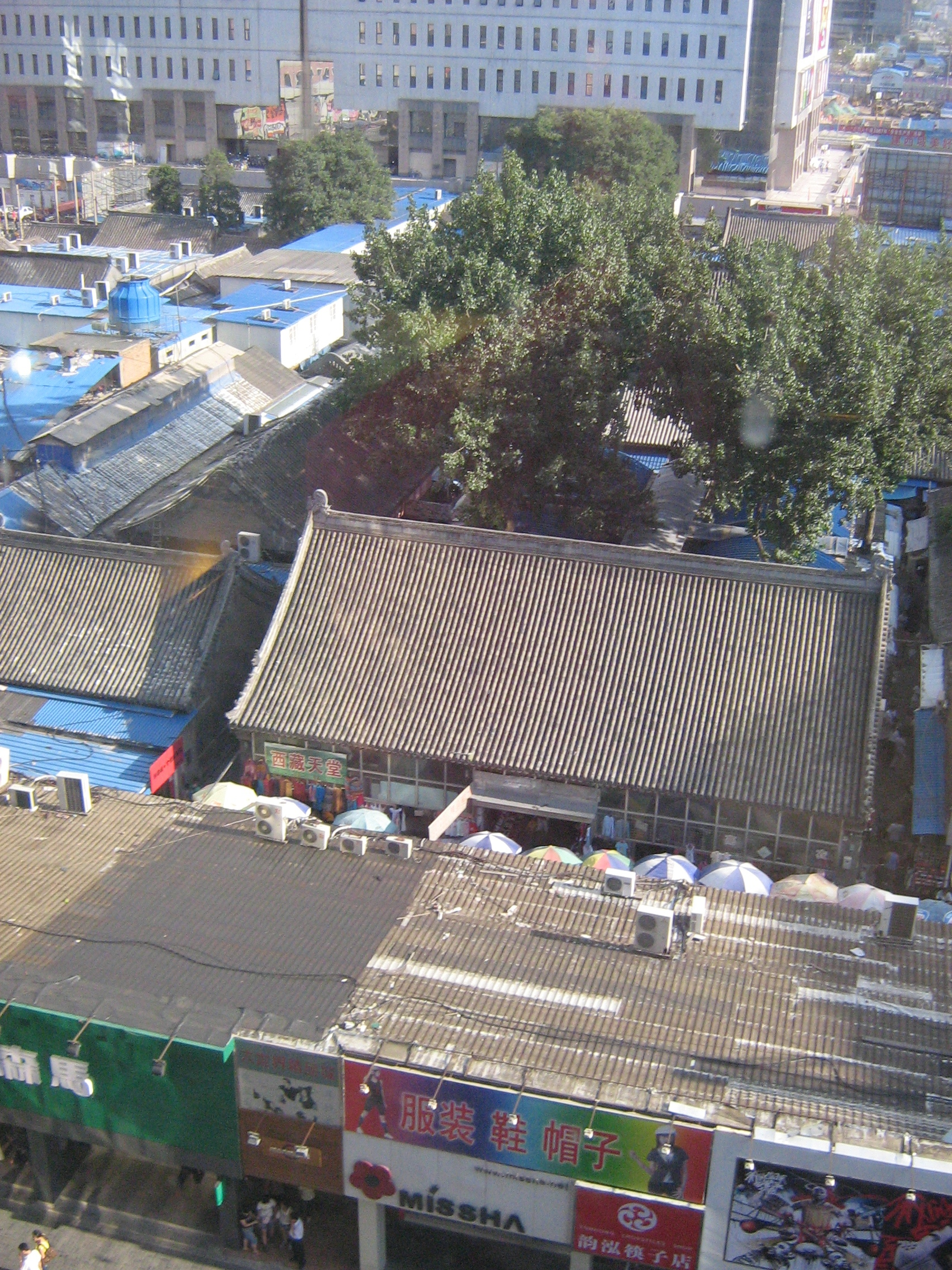 Beijing Meng Zang School 国立蒙藏学校旧址